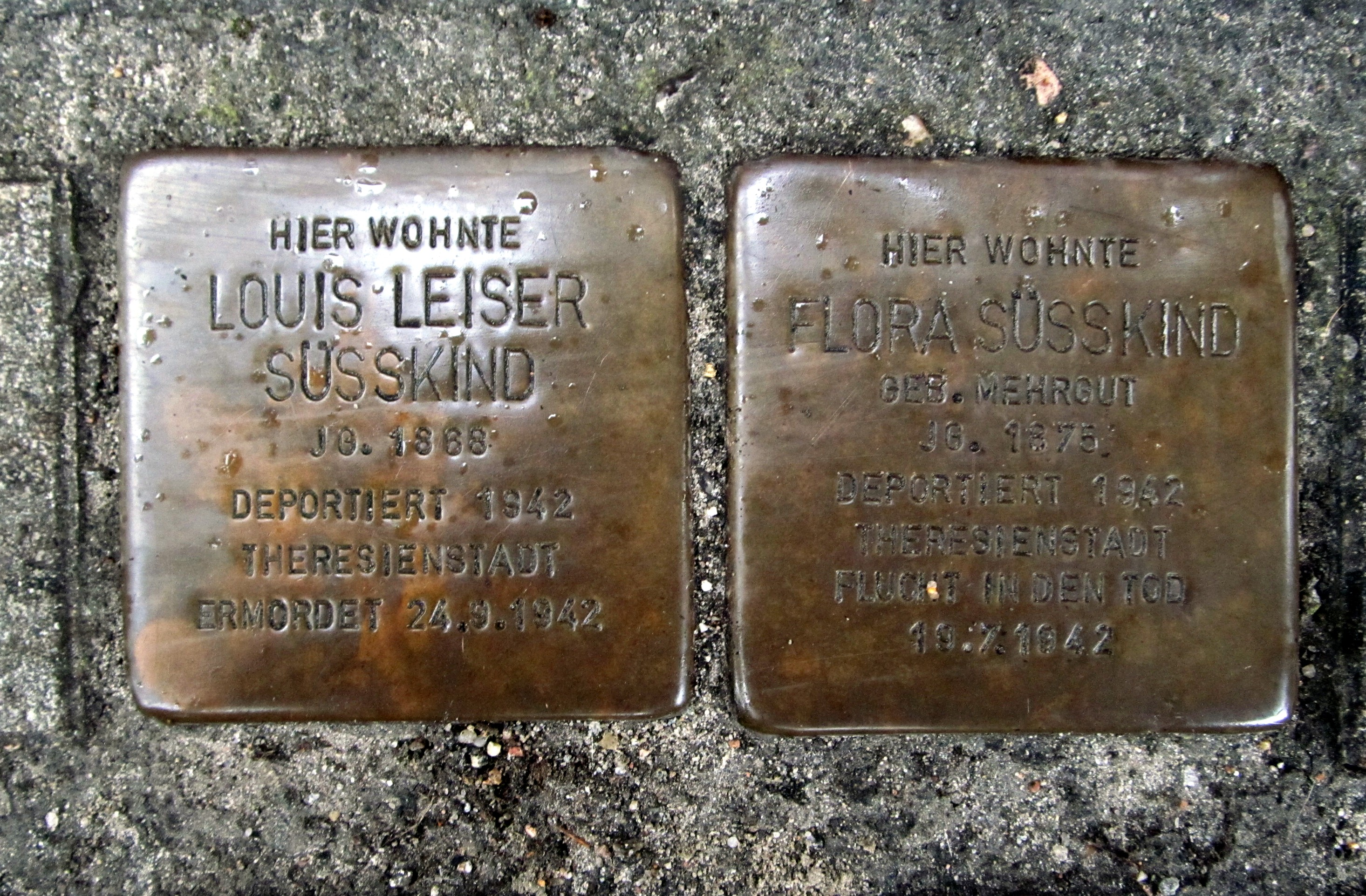 Stolpersteine für Flora und Louis Leiser Süsskind, Sievekingsallee 39 in Hamburg-Hamm